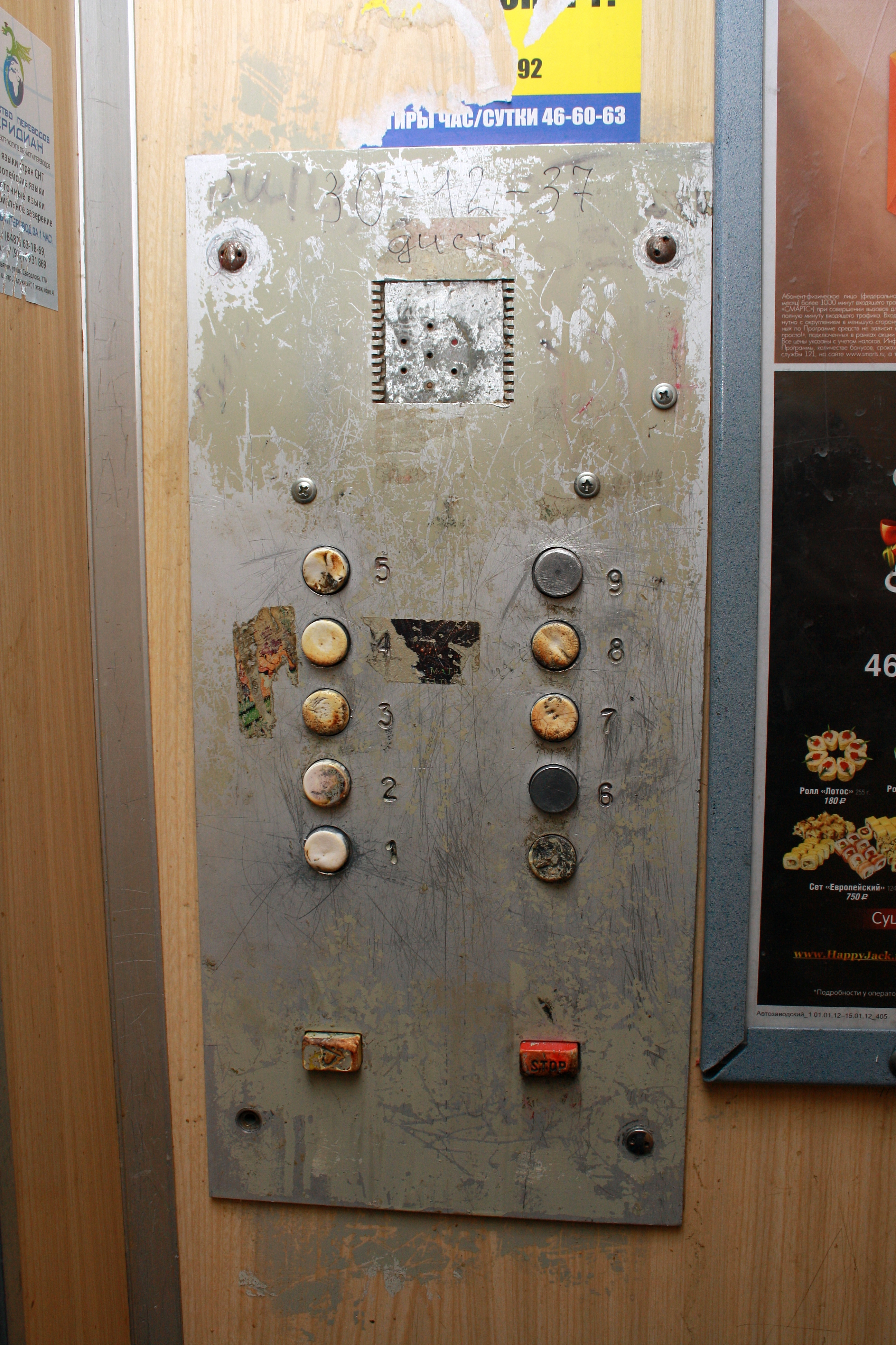 Кнопки одного из старых лифтов г.Тольятти.